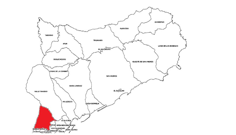 Localización del barrio